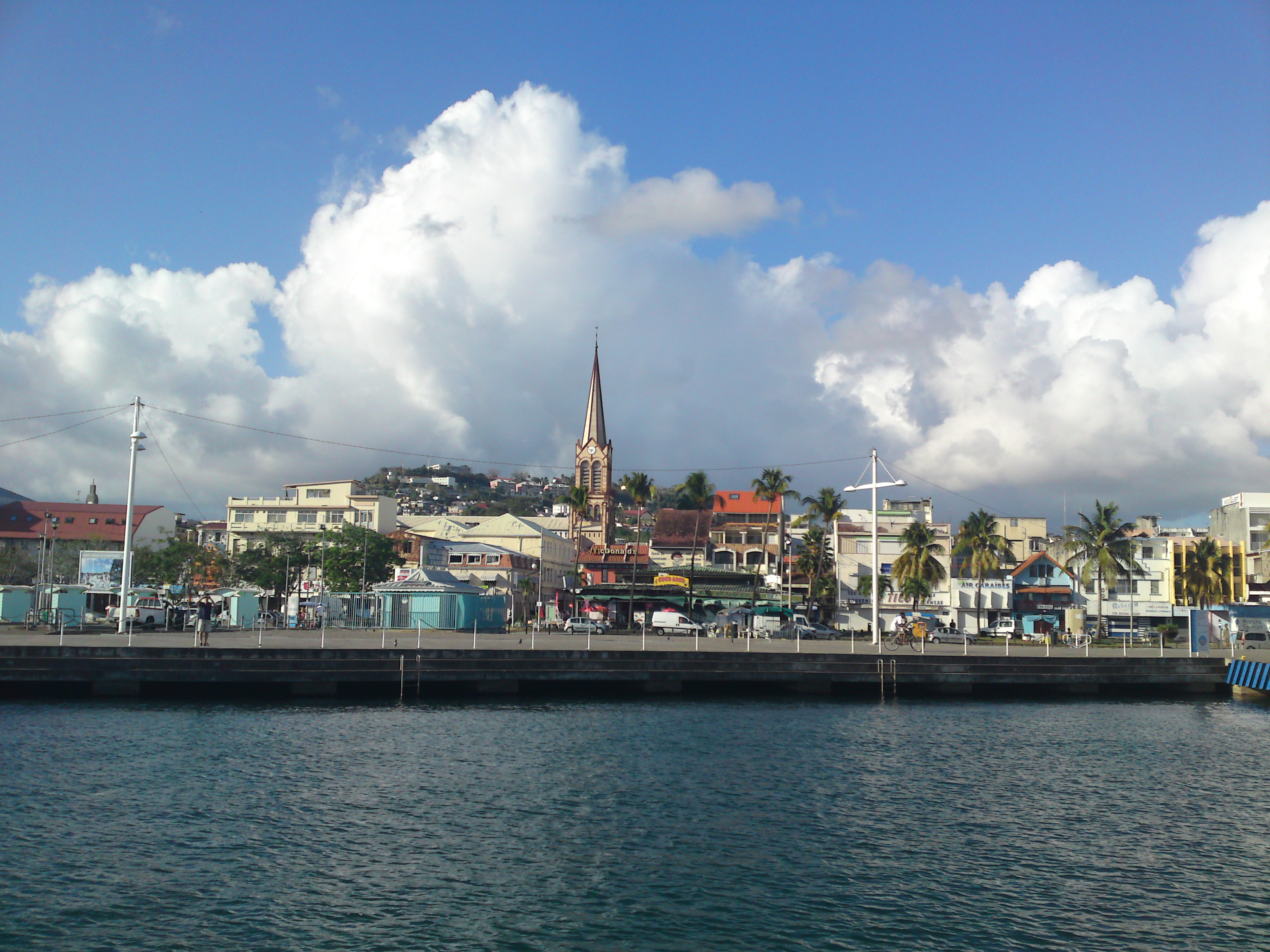 vue sur Fort de France, en revenant des Trois-Ilets, Martinique, avril 2009